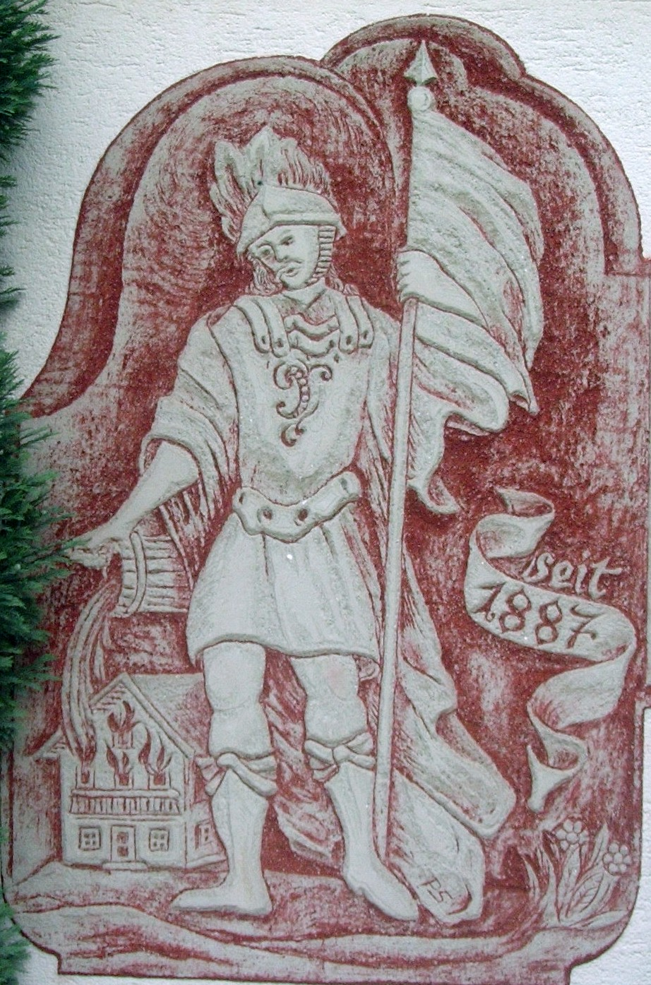 hl. Florian